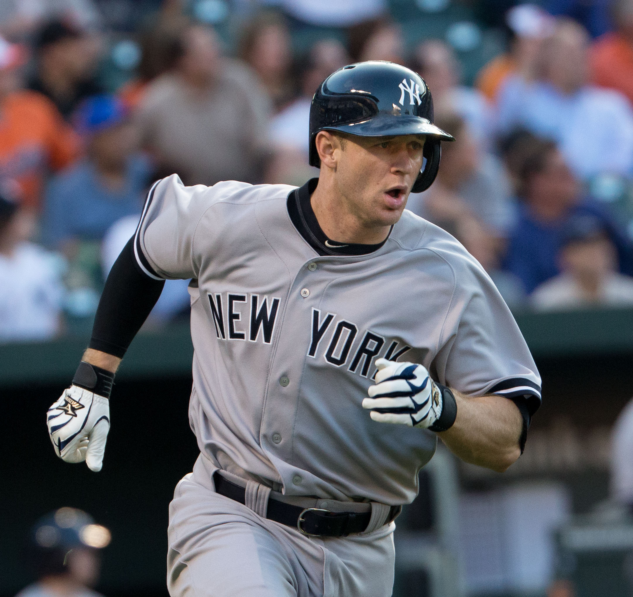 David Adams